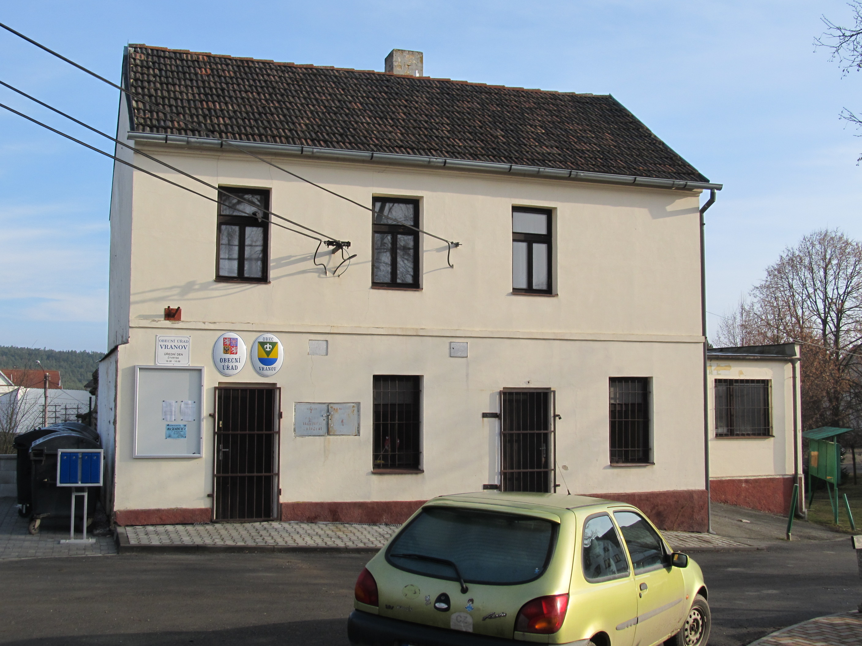 Vranov - OÚ